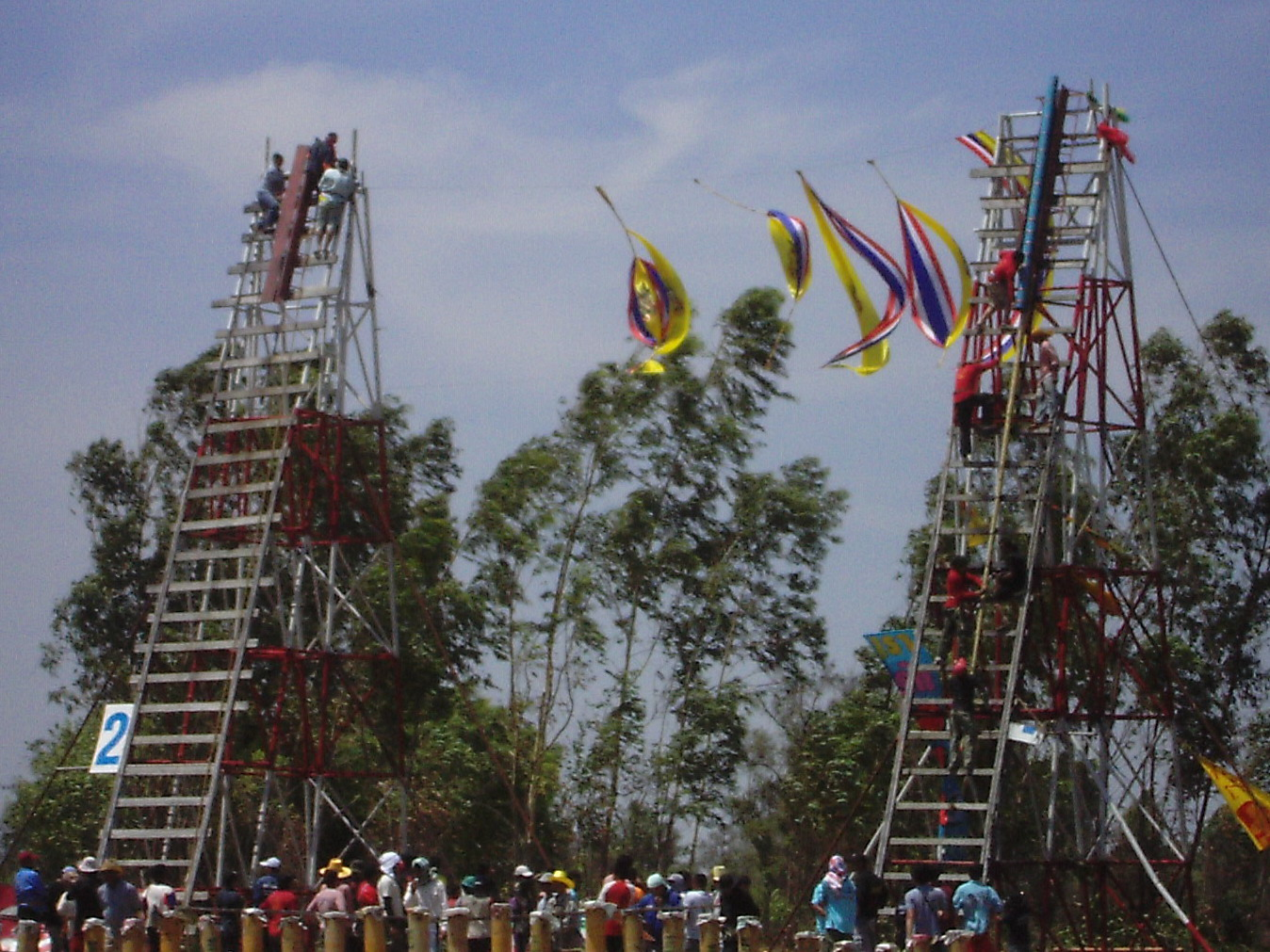 "Lan" launch racks at Phaya Taen Park